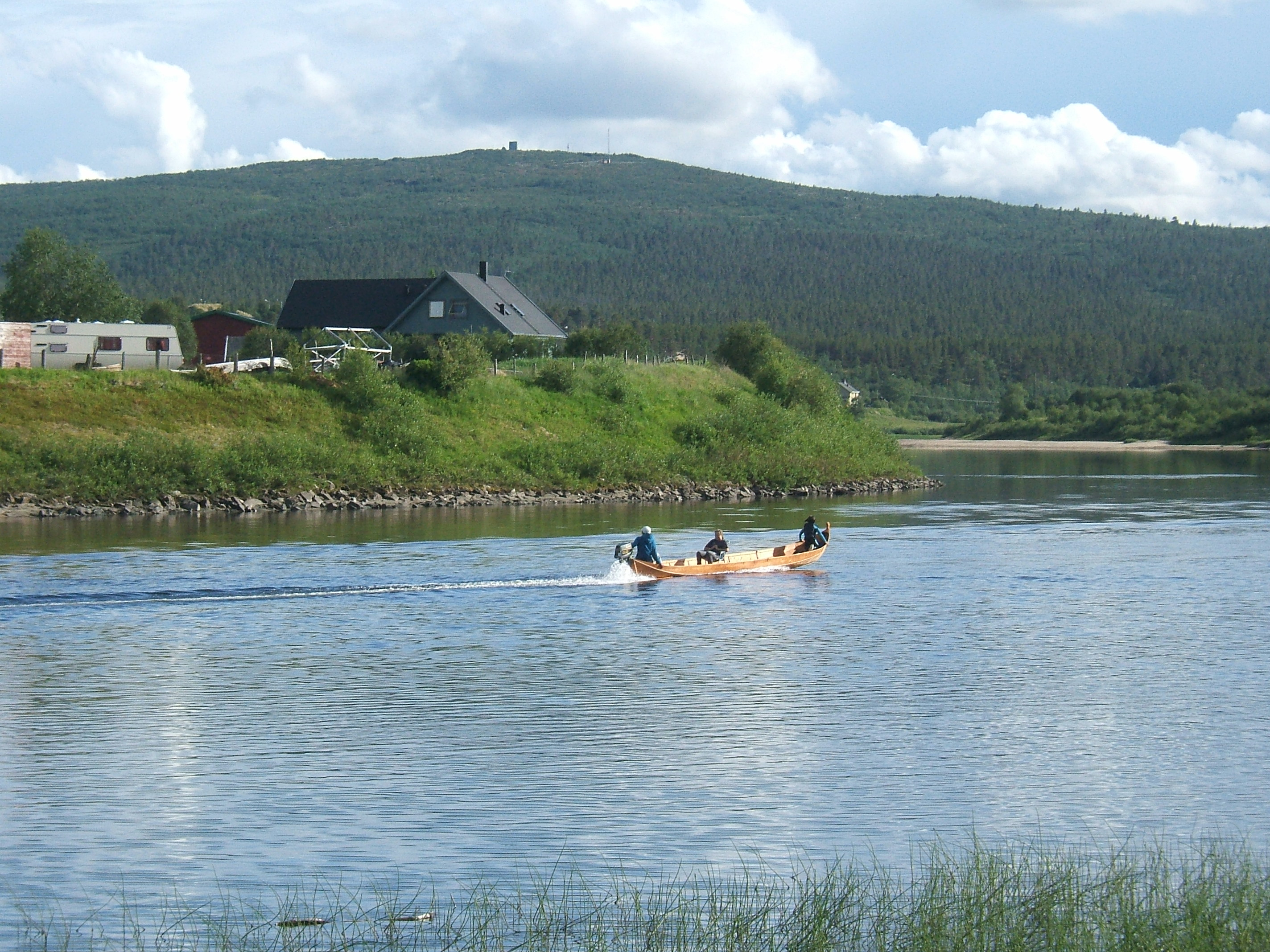 Kárášjokha river